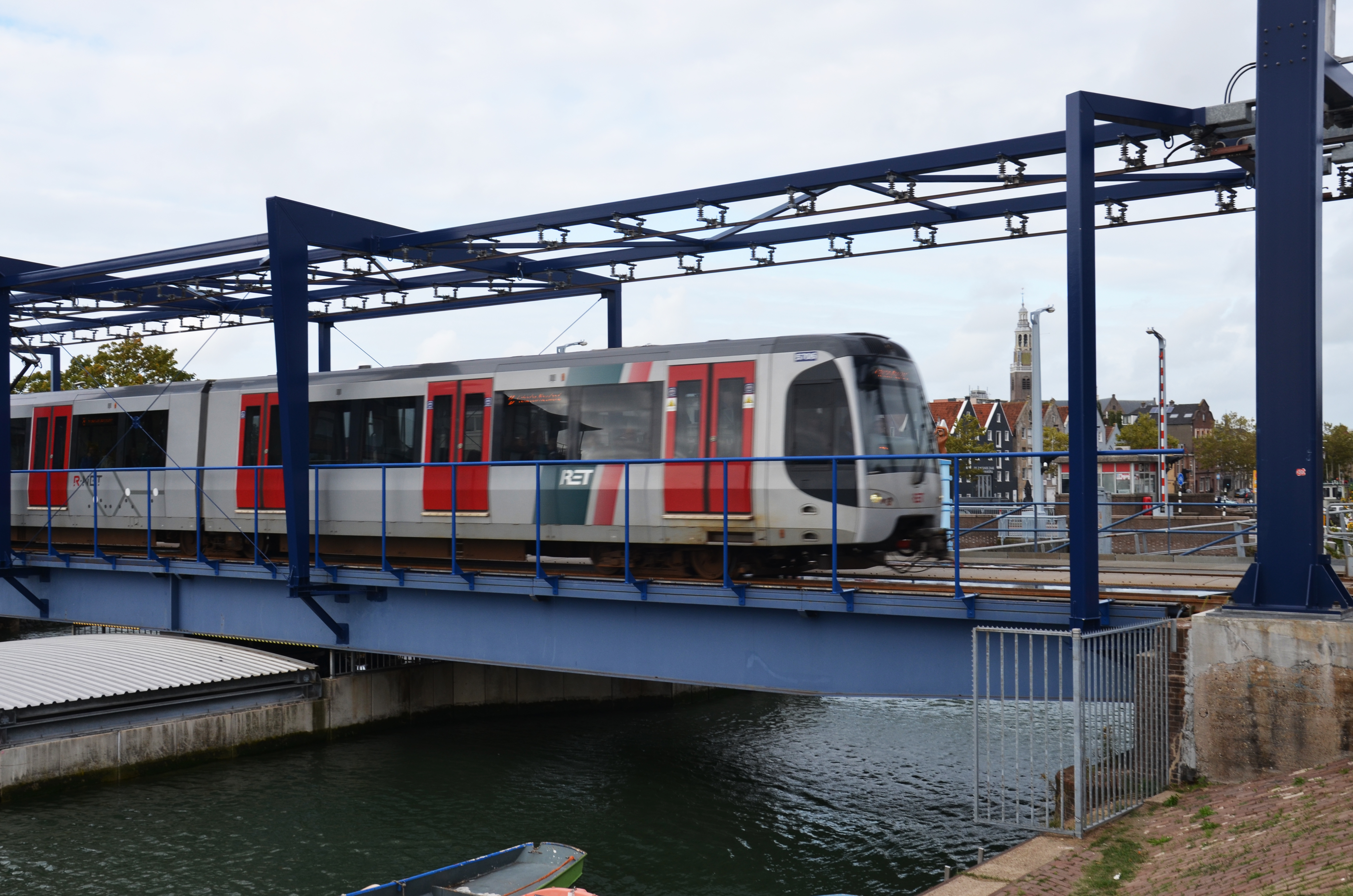 De Havenspoorbrug in Maassluis.